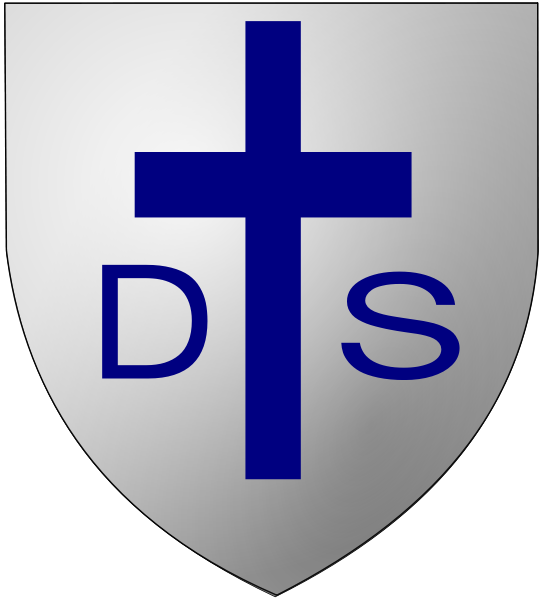 blason des sœurs de la charité de sainte Jeanne-Antide Thouret